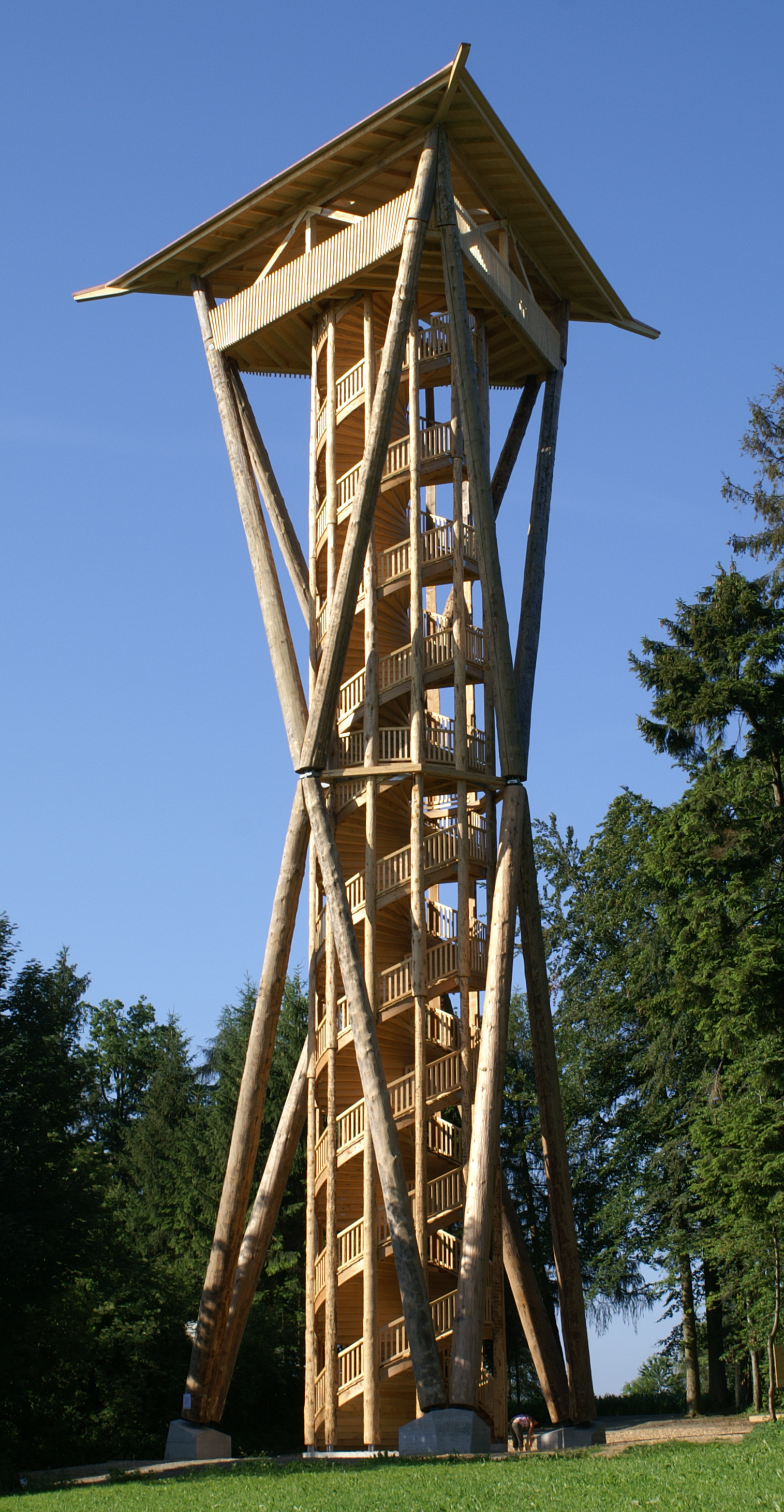 Wiler Turm